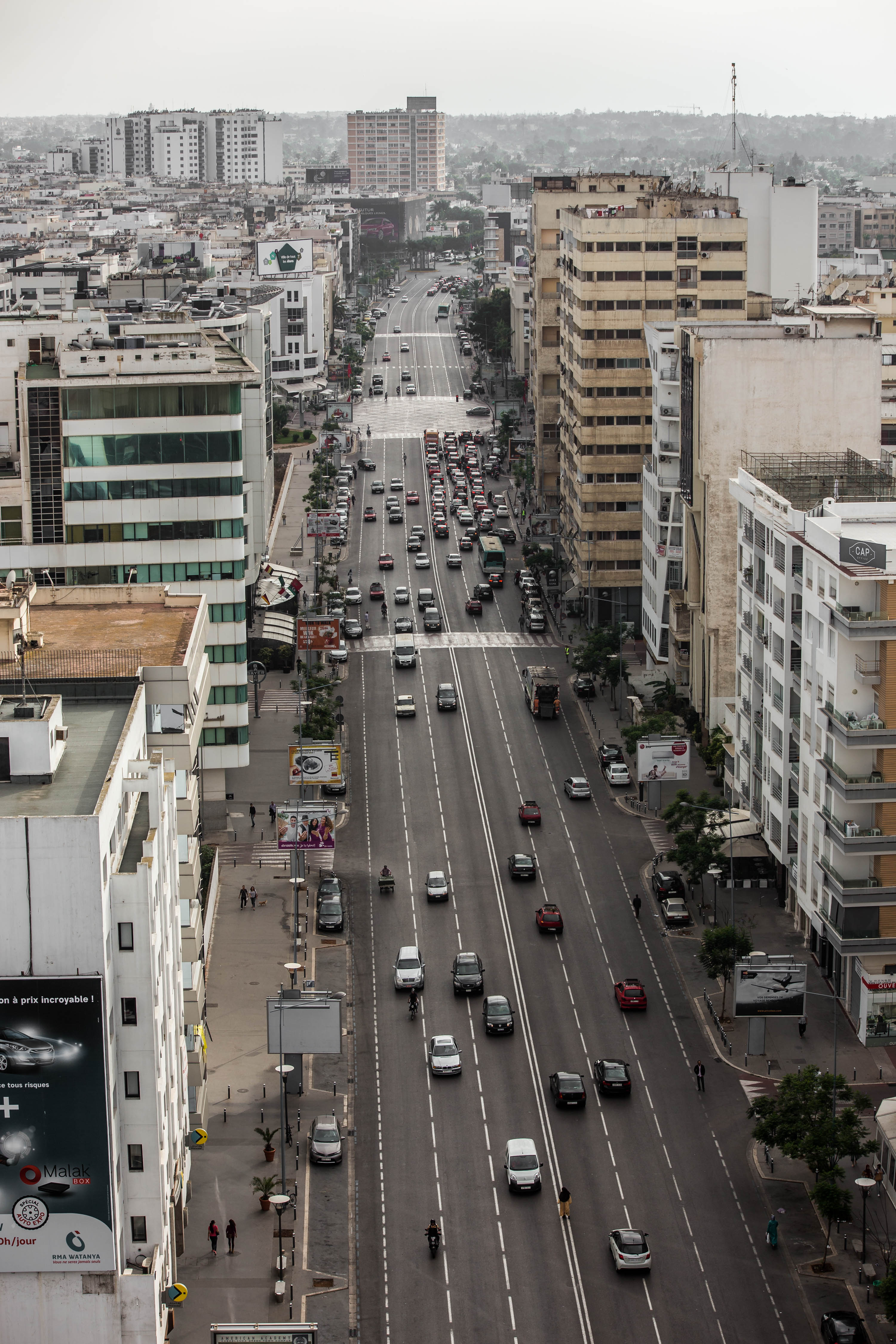 Photo prise depuis le toit du Barcelo